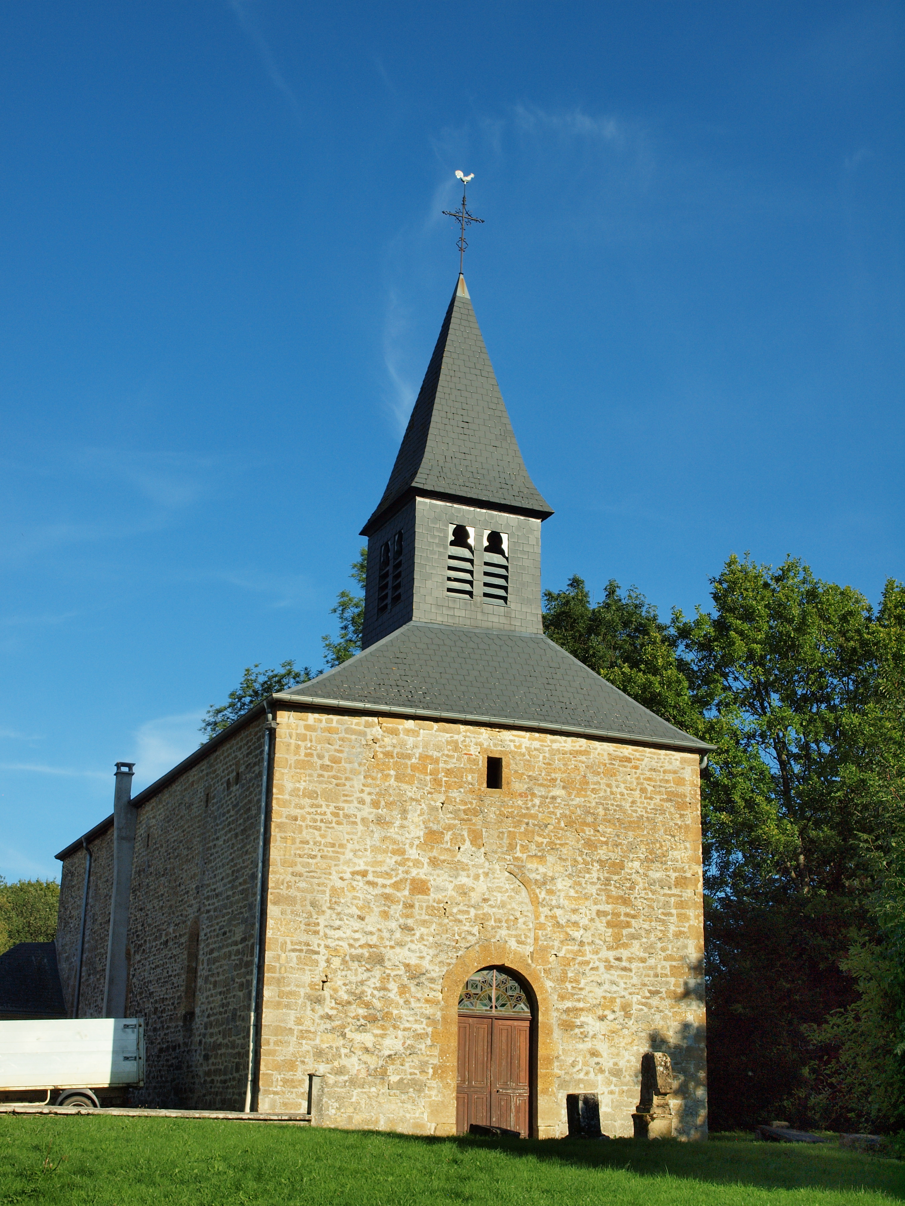 Boult-aux-Bois (Ardennes, France)